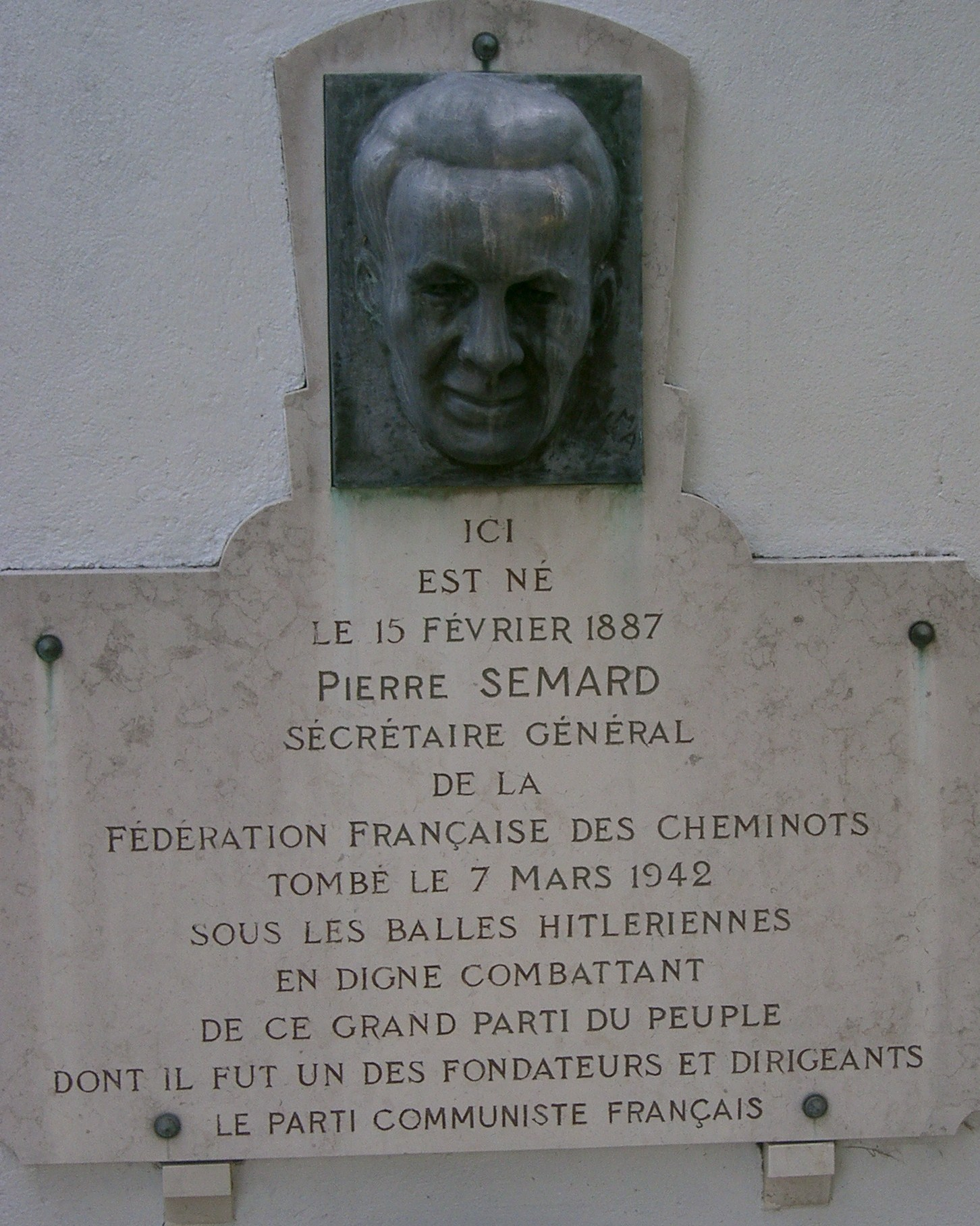 Stèle en hommage à Pierre Semard membre du Parti Communiste Français et Résistant, fusillé par l'occupant allemand le 7 mars 1942 à Évreux.